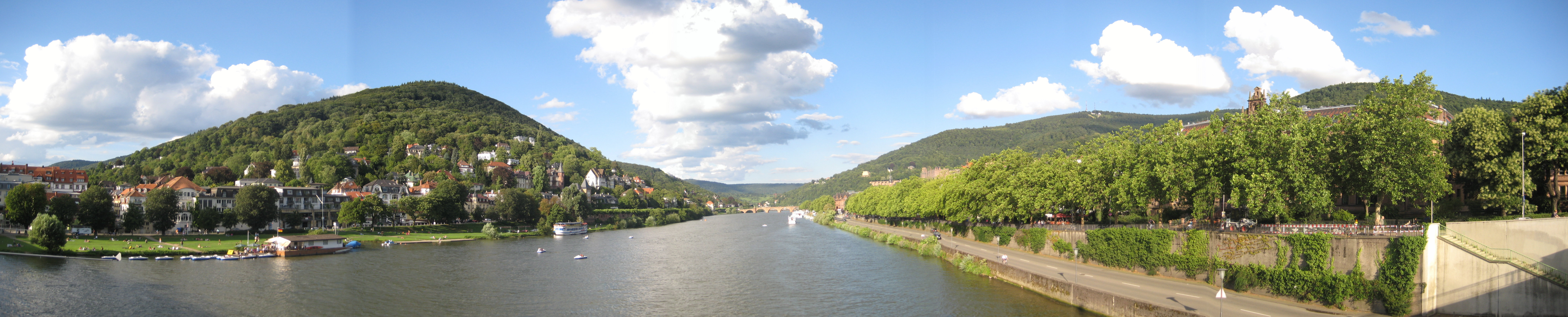 Der Neckar durchquert Heidelberg. Panorama von der Theodor-Heuss-Brücke. Links Neuenheim mit Neckarwiesen, rechts Altstadt.